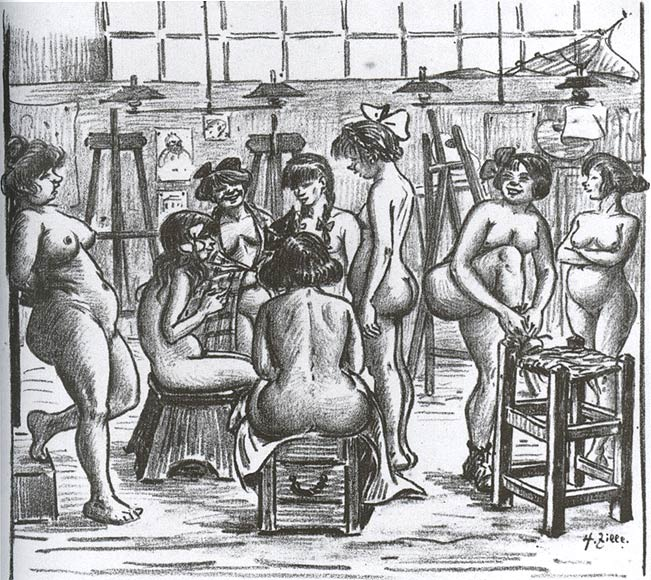 Modellpause